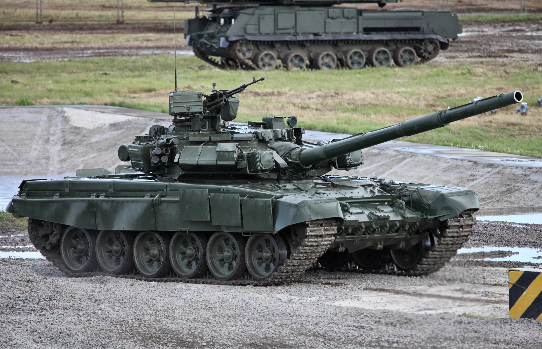 Основной боевой танк Т-90А (T-90A MBT)